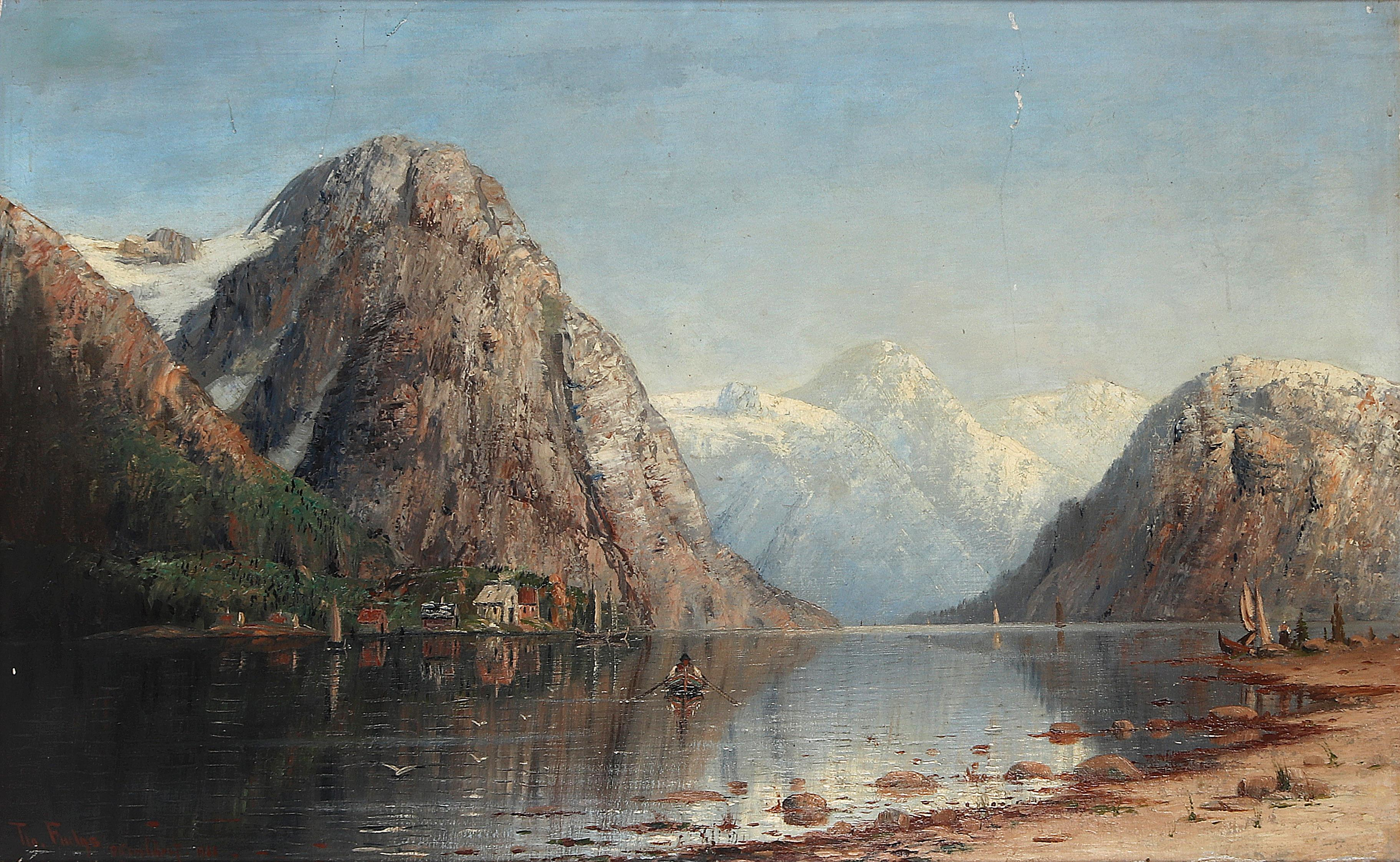 Fjordlandschaft, Öl auf Leinwand auf Karton, 55 x 68 cm, signiert und datiert 1900